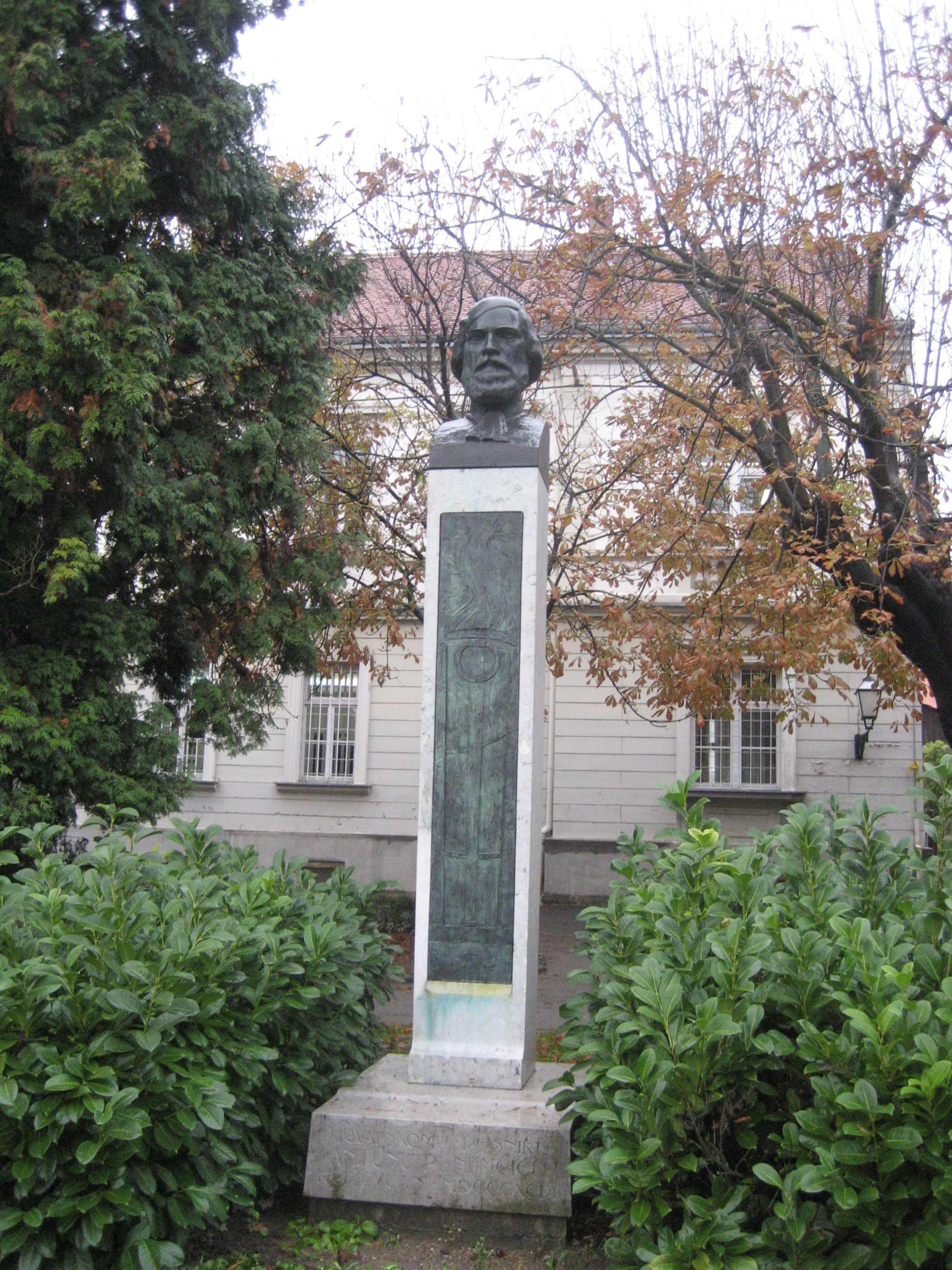 Antun Nemcic Spomenik, Krizevci, Croatia